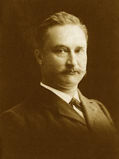 Foto van Eugene Dubois, werd in een memoriam afgebeeld.